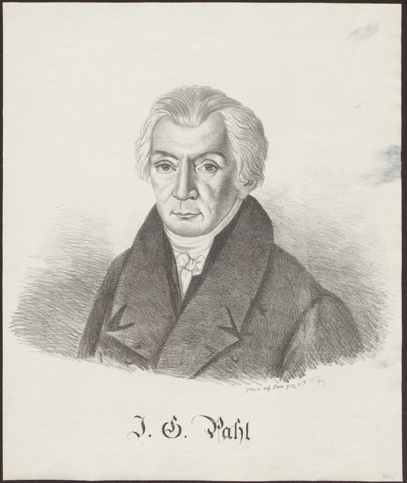 Johann Gottfried Pahl, Lithographie